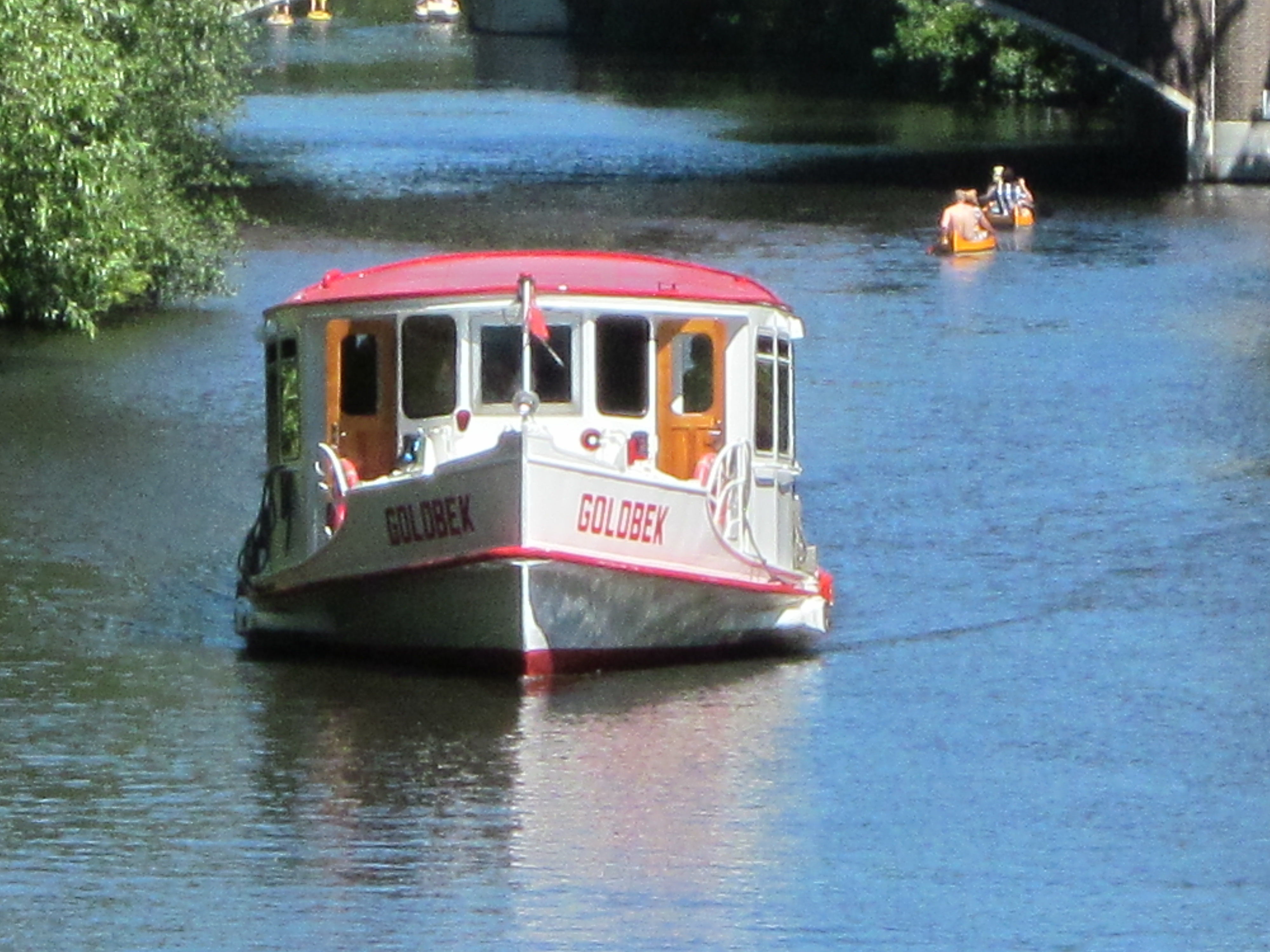 Der Alsterdampfer Goldbek auf dem gleichnamigen Kanal in Winterhude zwischen der Saarlandstrassenbrücke (hinten) und der Barmbekerstrassenbrücke (Standort des Photographen).